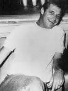 Felton Jarvis, Record Producer of Elvis Presley